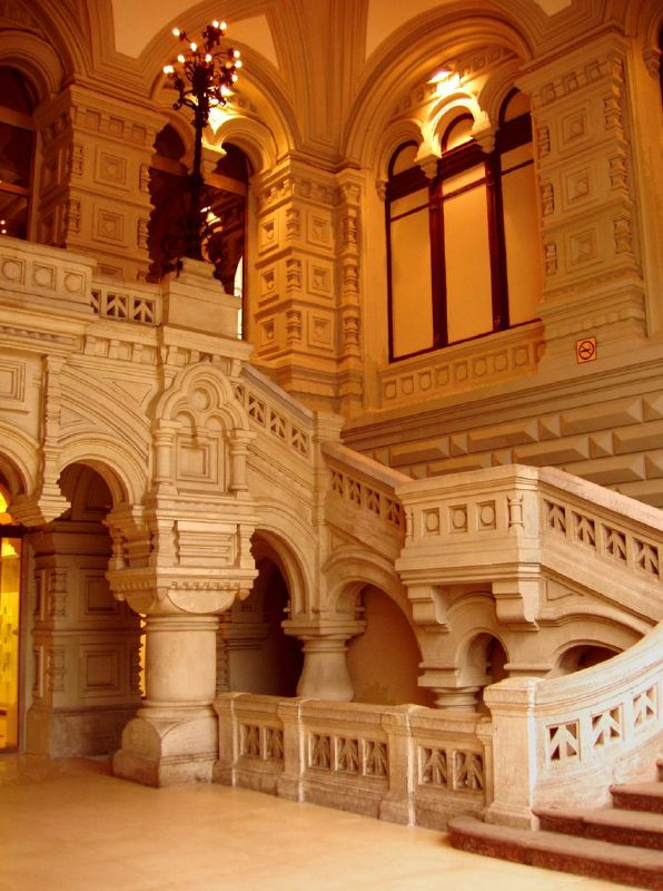 Moscow GUM